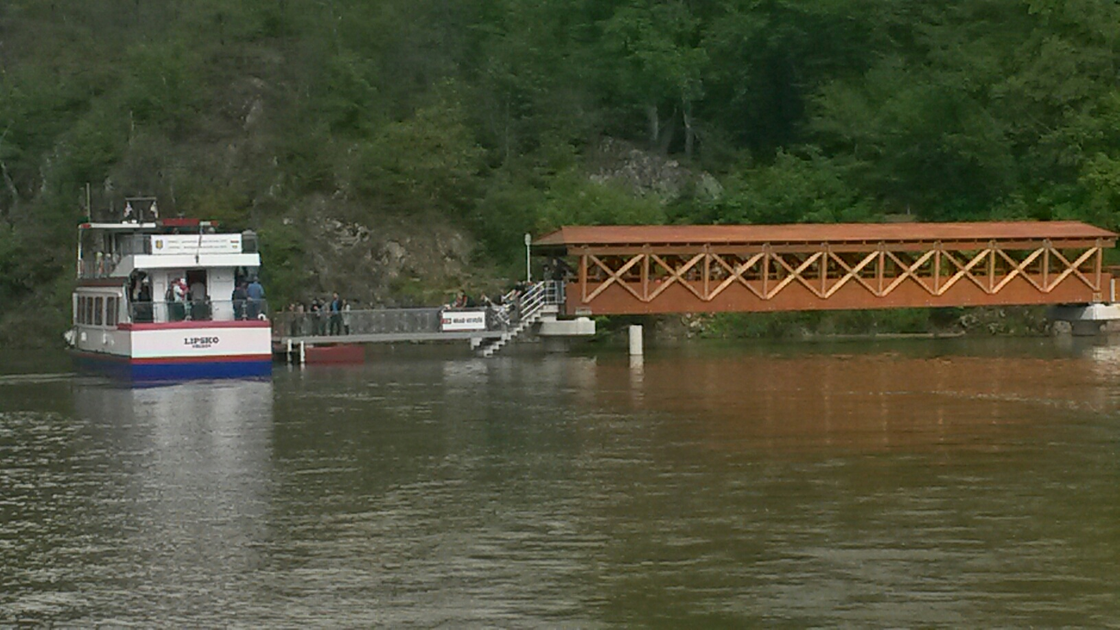 Brno, přehrada, zastávka Hrad Veveří